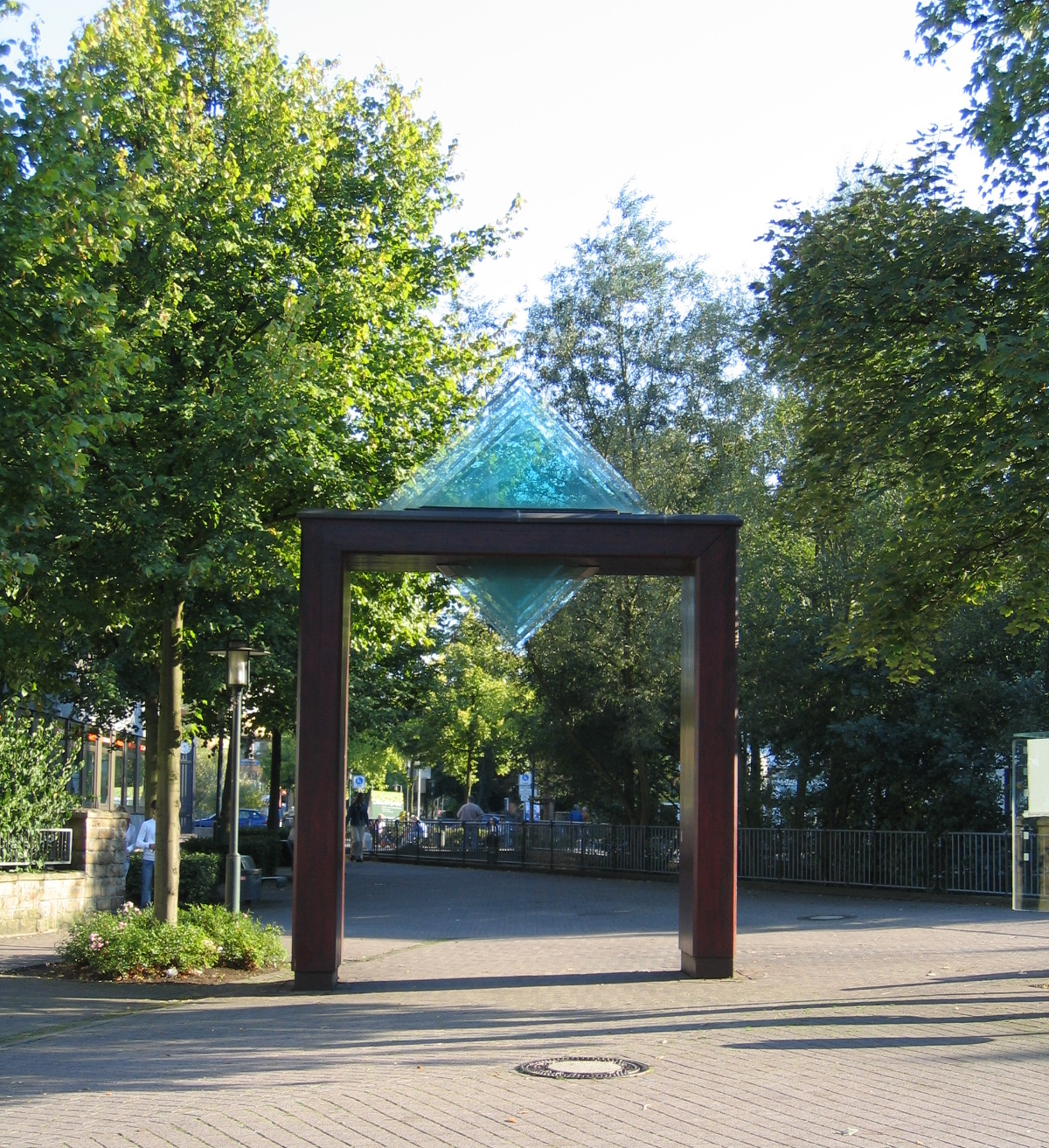 Stadttor am Rande der Fußgängerzone in Hemer.)